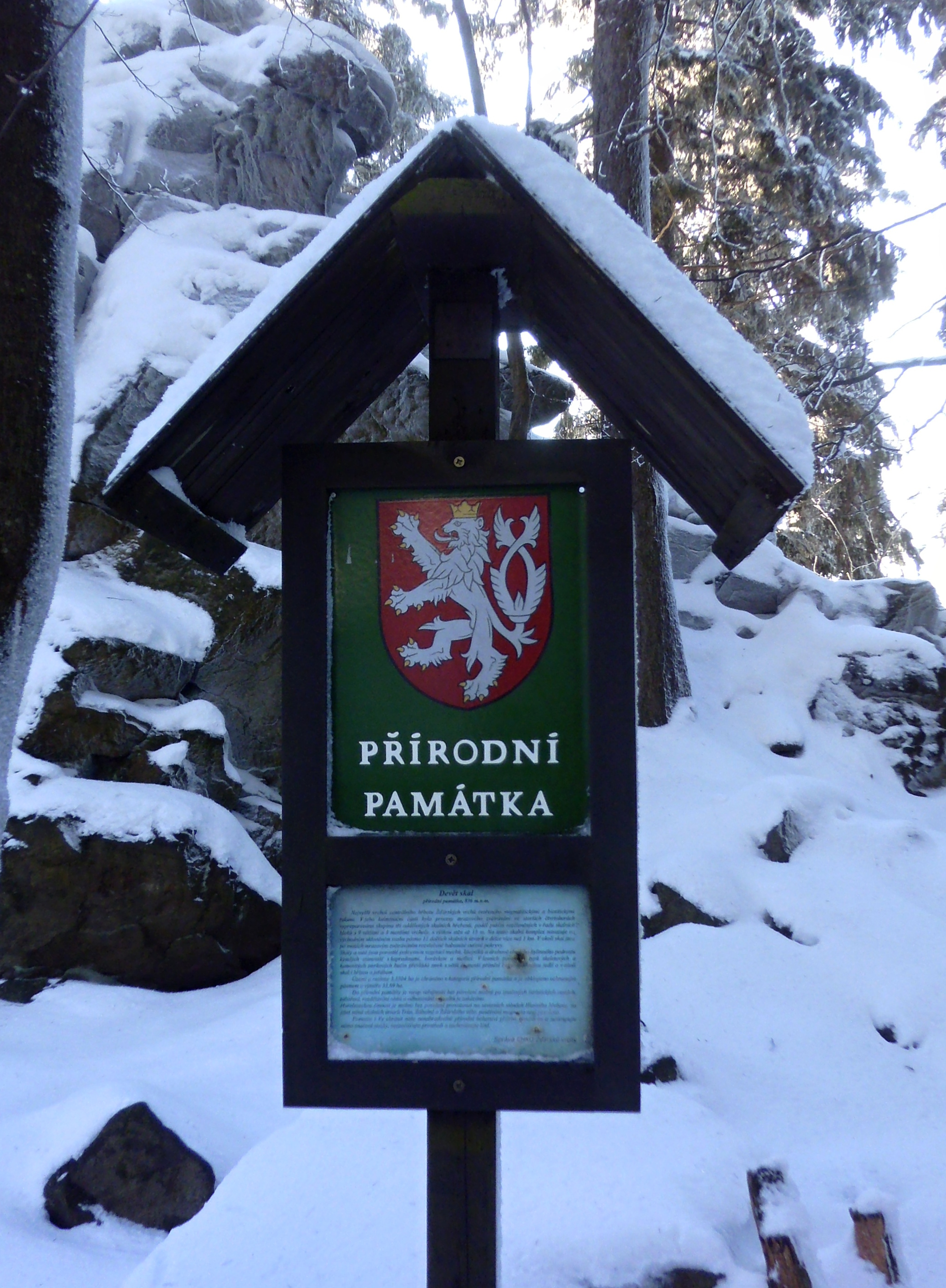 PP Devět skal